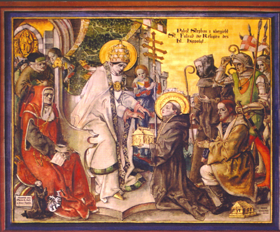 Fulrad reçevant en grand apparat du pape Etienne II, les reliques de Saint-Hippolyte. Fresque se trouvant dans le choeur, côté Epître de l'église de Saint-Hippolyte